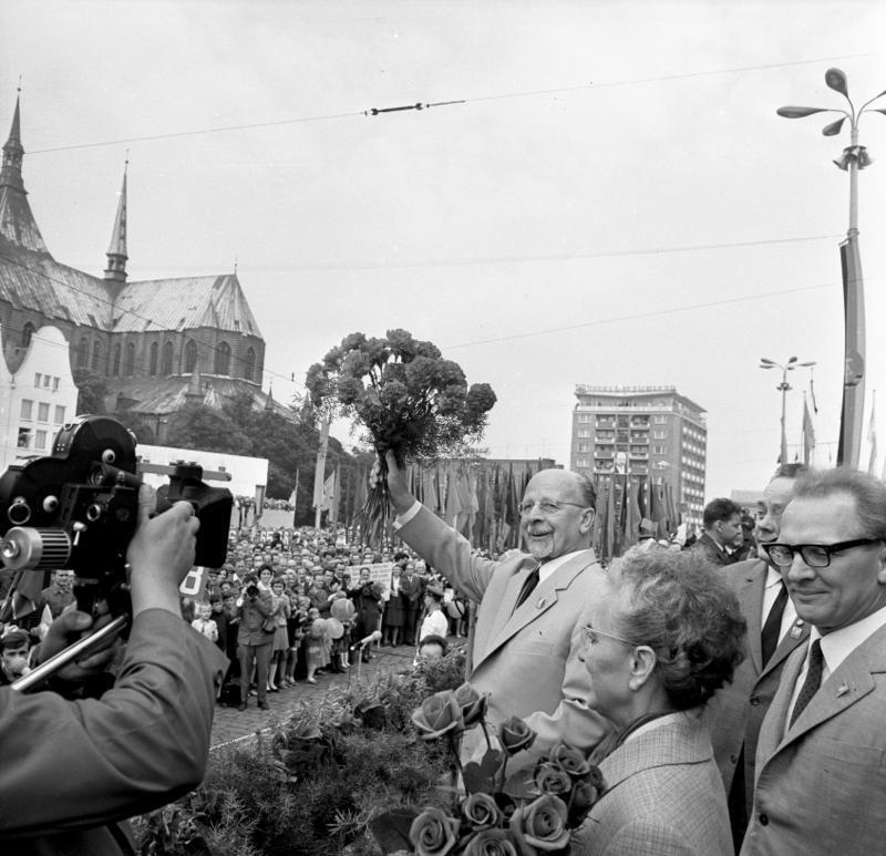 Rostock, Eröffnung der Ostseewoche Zentralbild/Kohls 9.7.1967 10. Ostseewoche Rostock: Jubiläums-Ostseewoche 1967 eröffnet Begeistert wird der Erste Sekretär des ZK der SED und Vorsitzende des Staatsrates der DDR, Walter Ulbricht, beim Betreten der Tribüne auf dem Rostocker Ernst-Thalmann-Platz begrüßt. Im Vordergrund die Gattin Walter Ulbrichts, rechts das Mitglied des Politbüros und Sekretär des ZK, Erich Honecker. Als Manifestion eines Jahrzehnts gemeinsamen Wirkens aller verständigungswilligen Kräfte für Frieden und Sicherheit im Norden Europas ist am 9.7.1967 in Rostock die Ostseewoche 1967 eröffnet worden. Abgebildete Personen: Ulbricht, Walter: Staatsratsvorsitzender, Erster Sekretär des Zentralkomitees (ZK) der SED, Vorsitzender des Nationalen Verteidigungsrates, DDR Honecker, Erich: Staatsratsvorsitzender, Generalsekretär des ZK der SED, DDR (GND 118553399) Ulbricht, Lotte: Frauenkommission beim Politbüro der SED, wissenschaftliche Mitarbeiterin im Institut für Marxismus-Leninismus beim Zentralkomitee (ZK) der SED, DDR (GND 124576559)